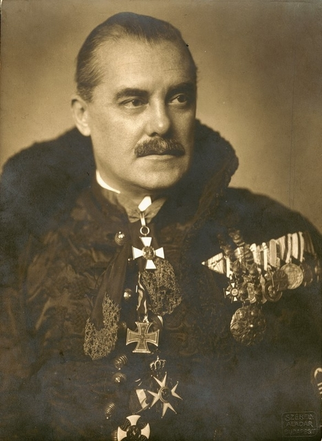 Kozma Miklós arcképe